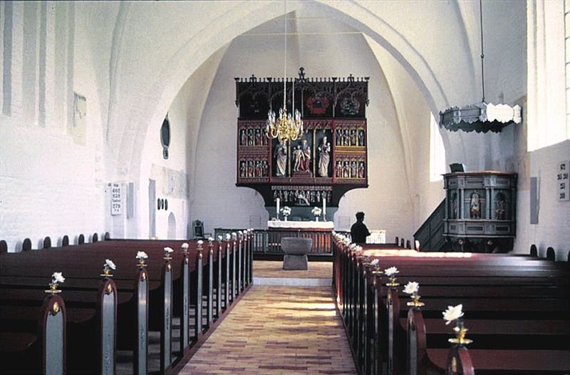 Kirkerummet da: Tvilum Kirke